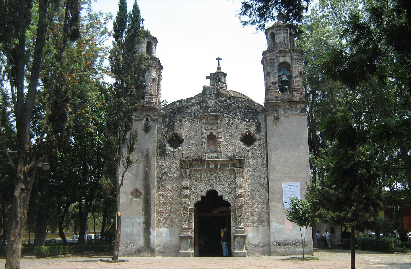 Iglesia de la "Conchita" en Coyoacan.